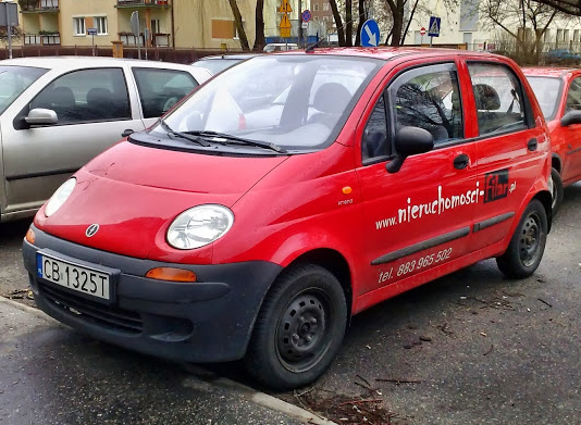 FSO Matiz M100 w Bydgoszczy.